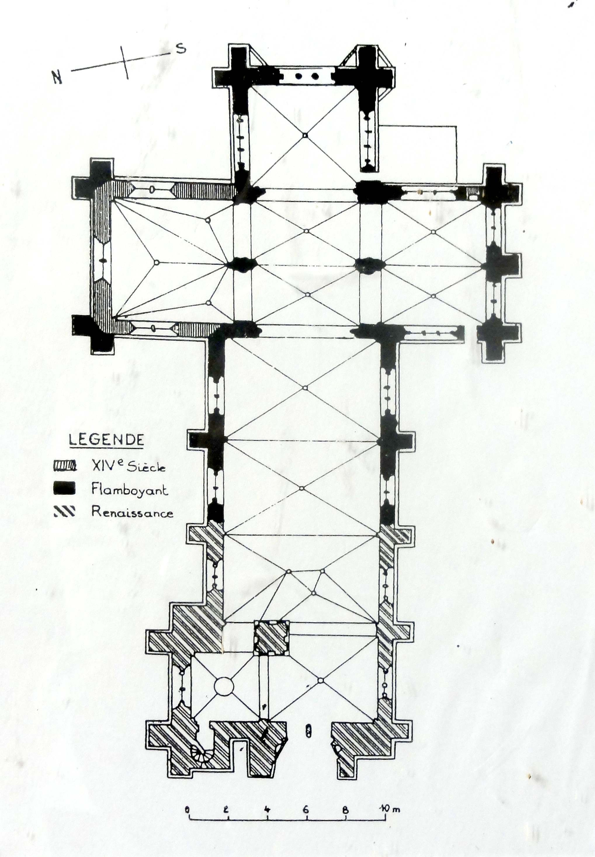 Vieux plan de l'église.